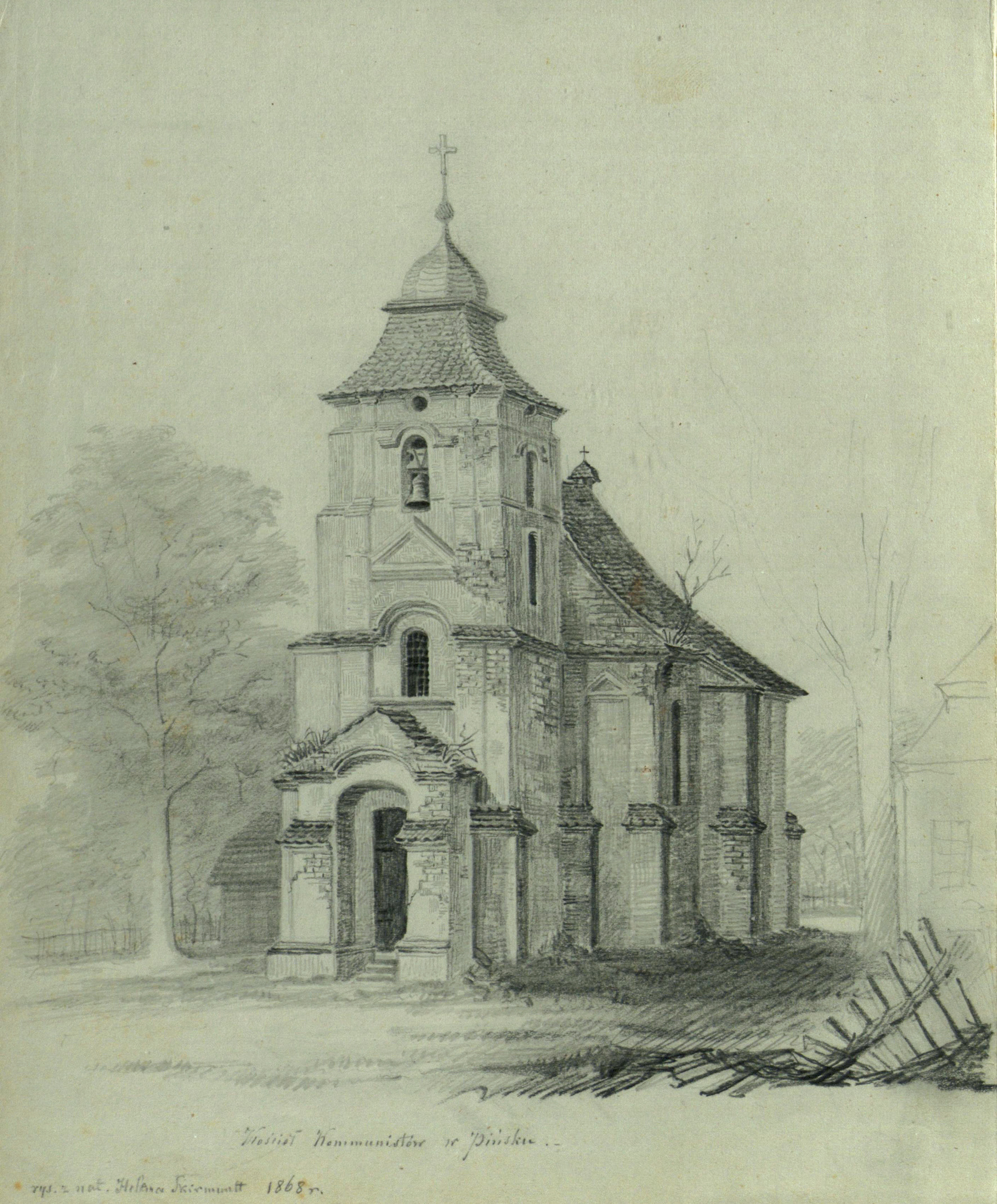 Беларуская (тарашкевіца): Пінск (Pinsk), вуліца Альбрэхтаўская (vulica Albrechtaŭskaja). Касьцёл Сьвятога Карла Барамэя